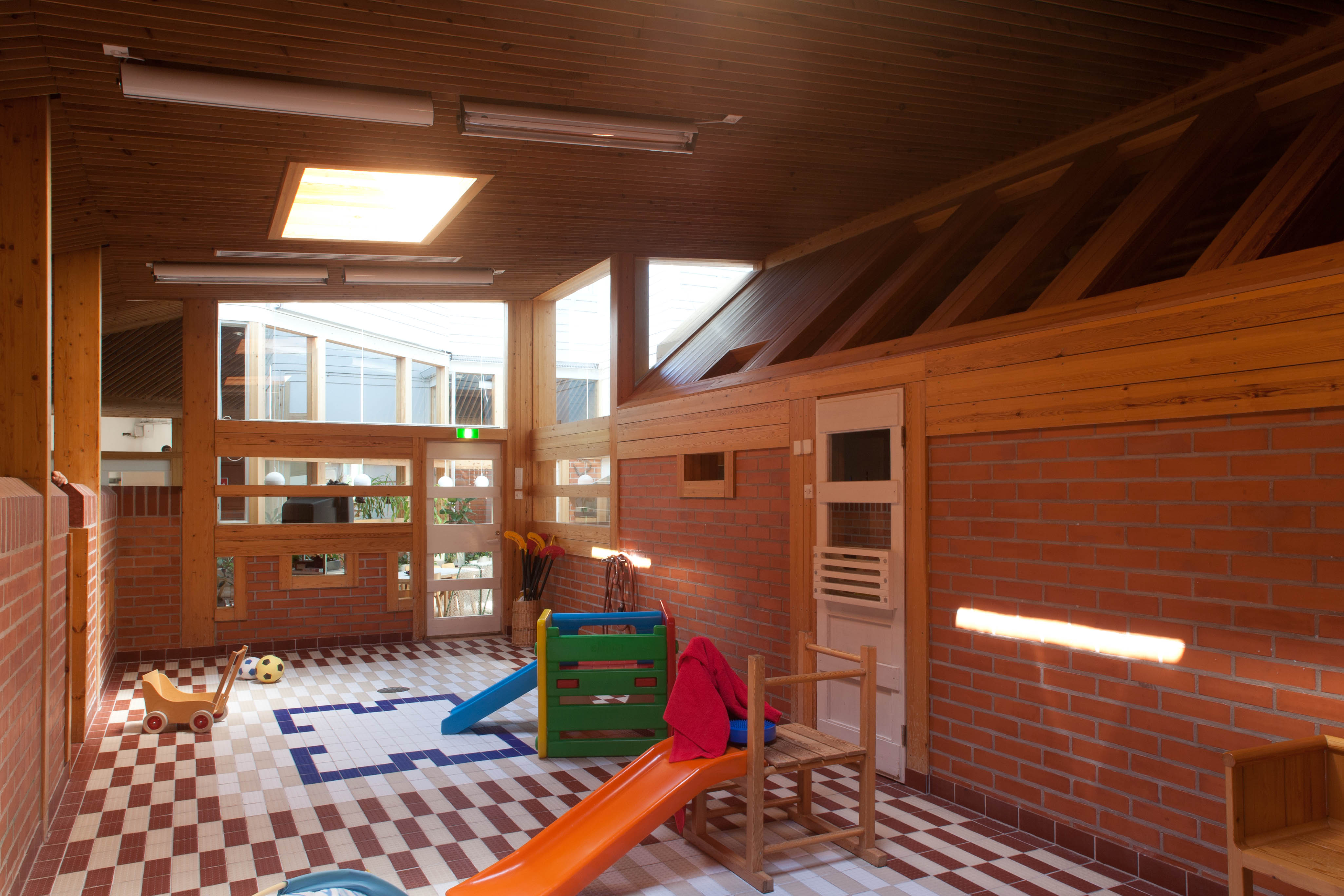 Pori. Raili ja Reima Pietilä, 1984. Päiväkoti Taikurinhattu